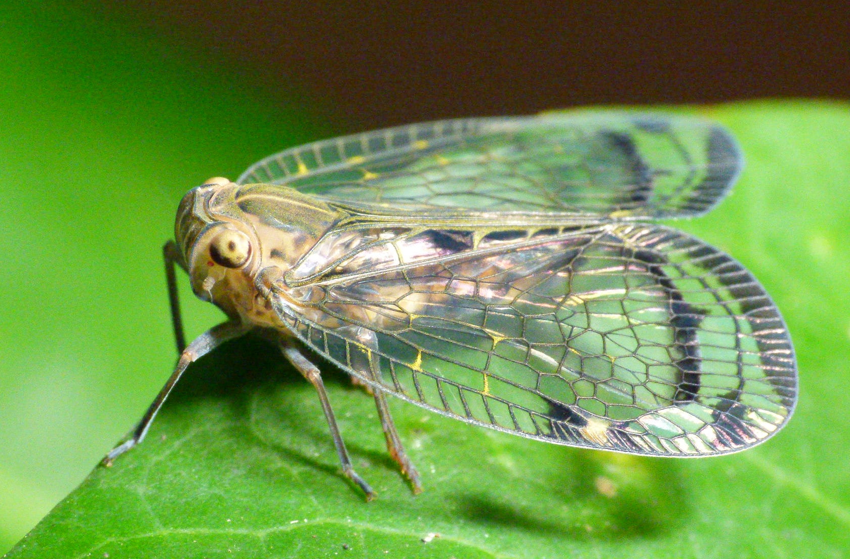 Nogodinidae. Western Ghats, Wayanad, India.